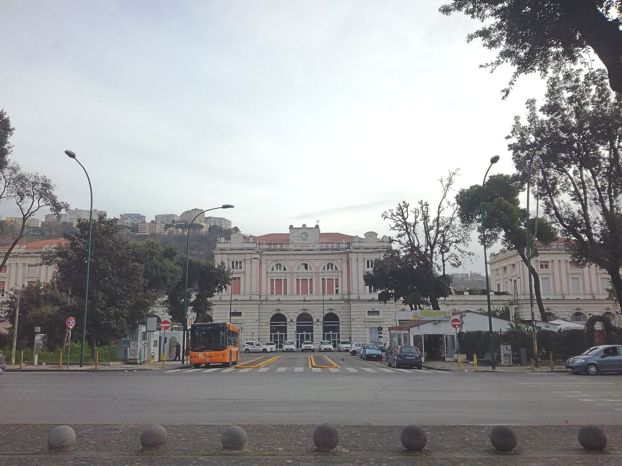 Stazione di Napoli Campi Flegrei